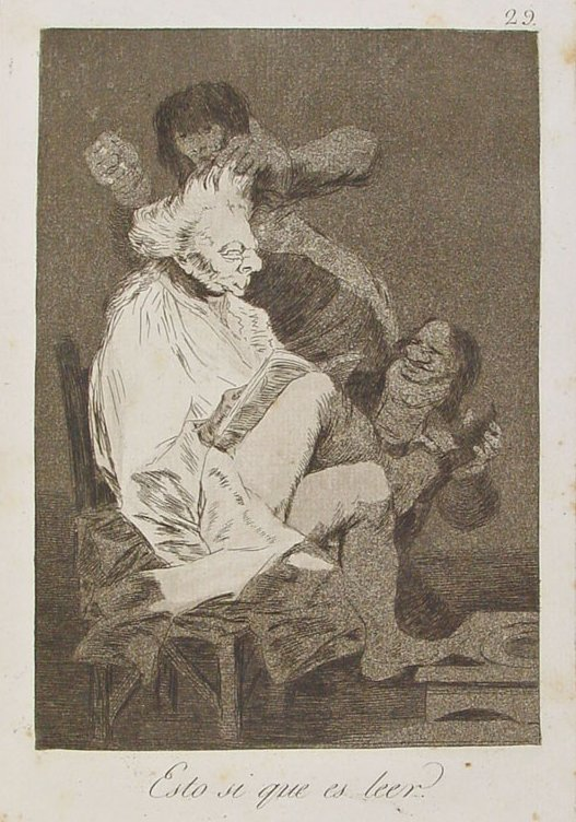 Capricho nº 29: Esto sí que es leer de Goya, serie Los Caprichos